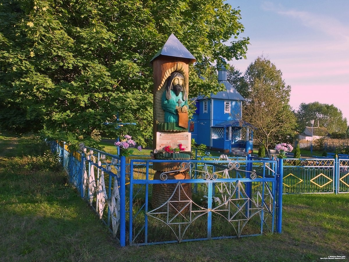 Вяляцічы. Мемарыяльны знак Францішку Савічу